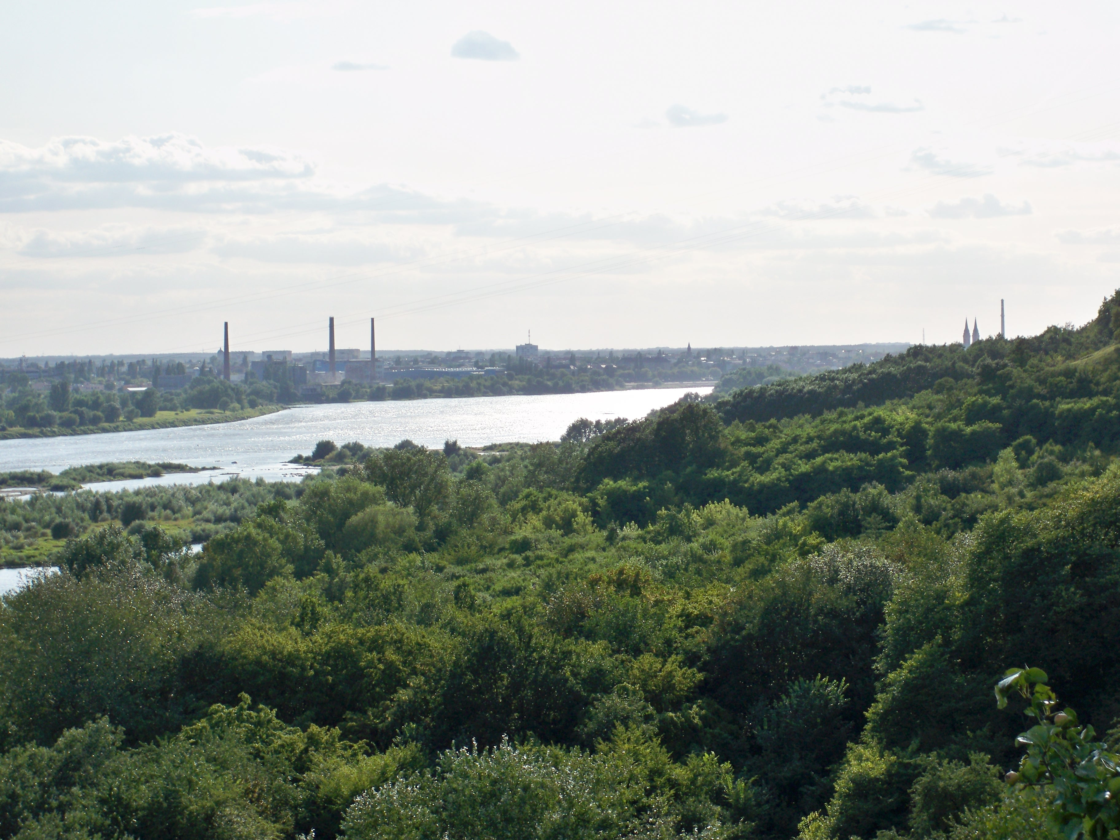 Wisła w 2009 r.